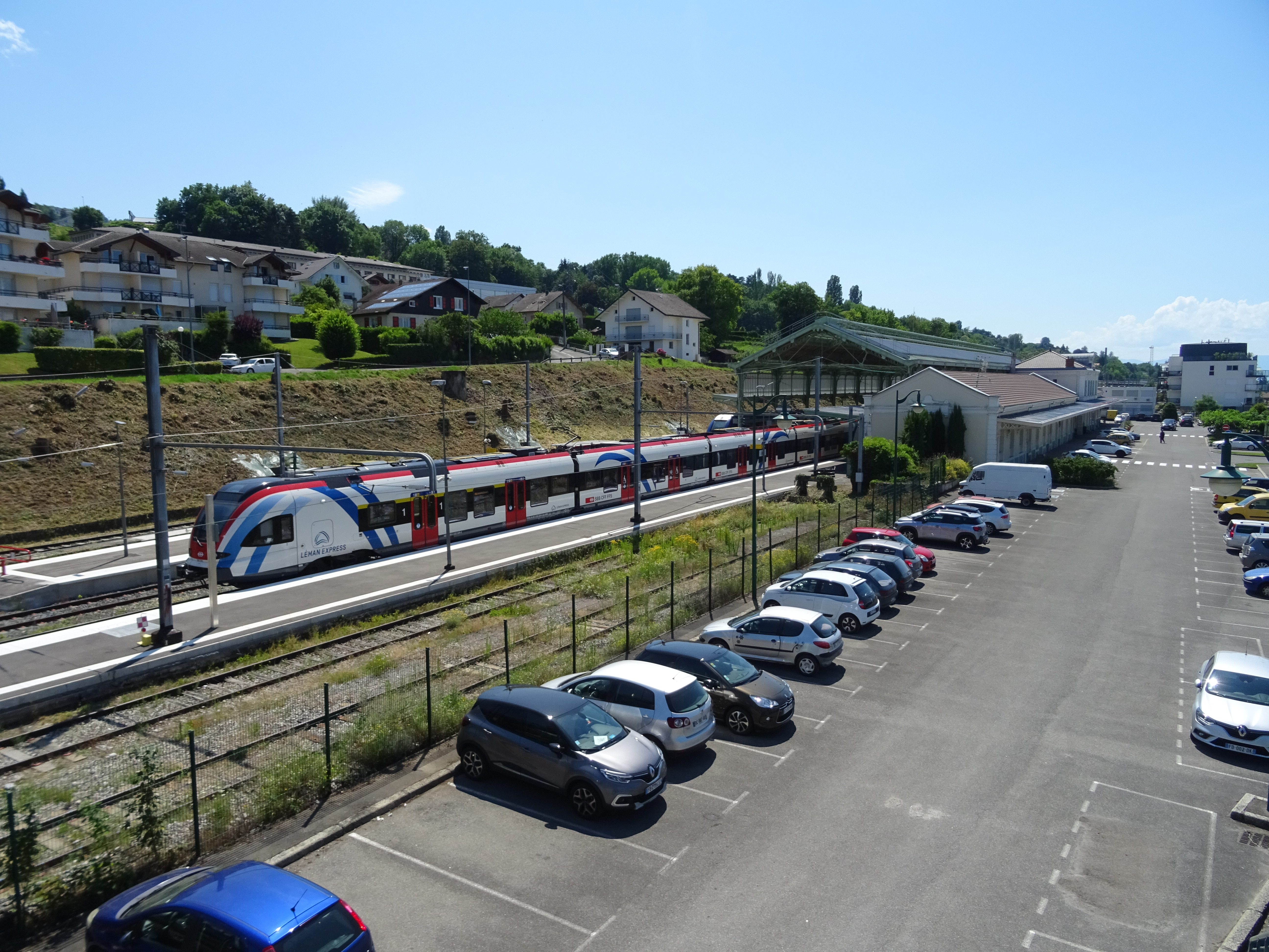 Vue générale de la gare d'Évian-les-Bains avec un Stadler FLIRT RABe 522 à quai.